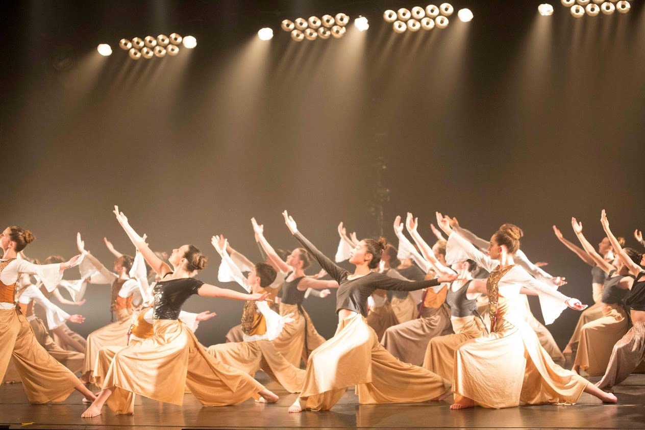 אל עיר אבנים